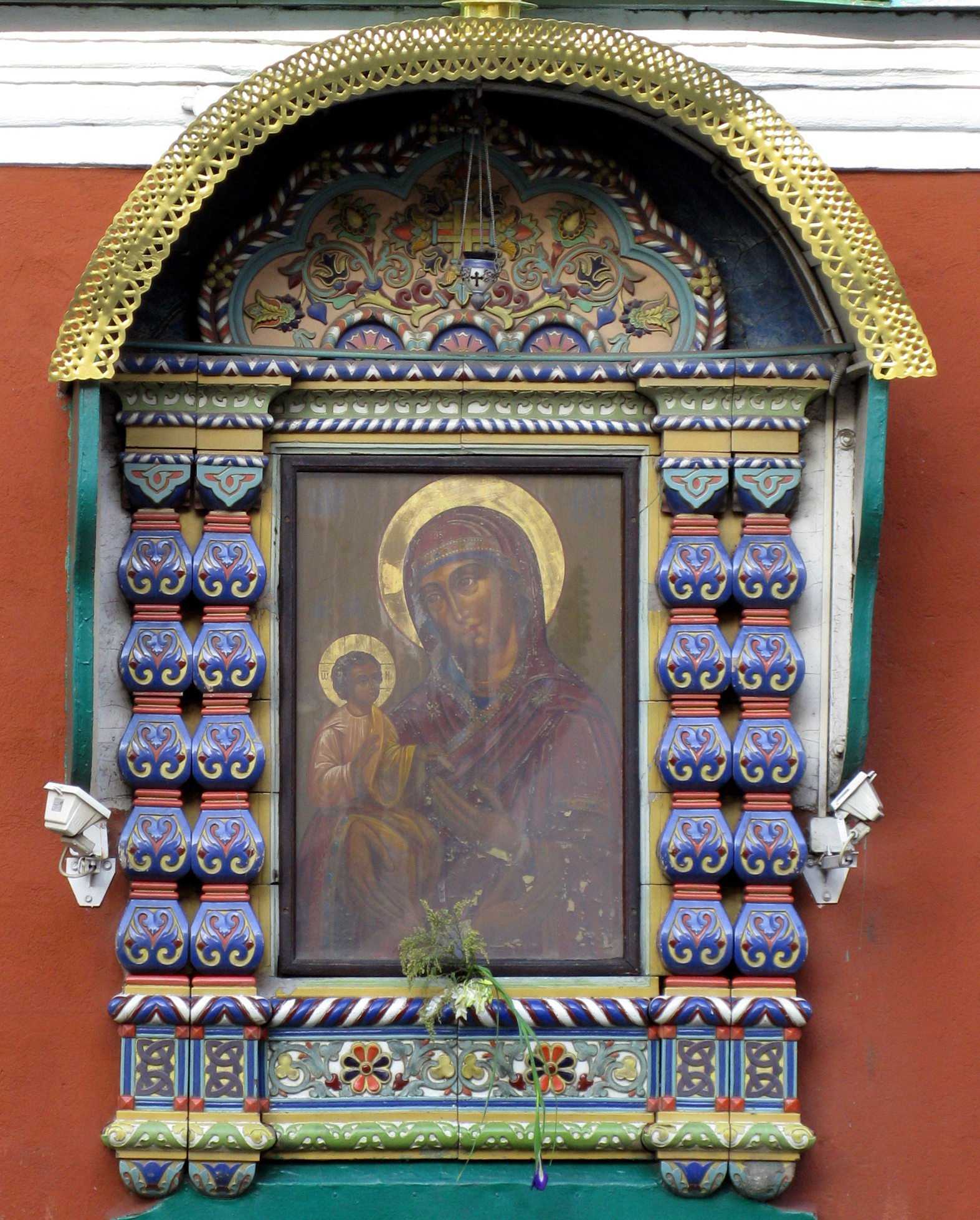 Храм Успения Пресвятой Богородицы в Гончарах (Москва) Список со чтимой иконы Божией Матери «Троеручица» (1716 г.).